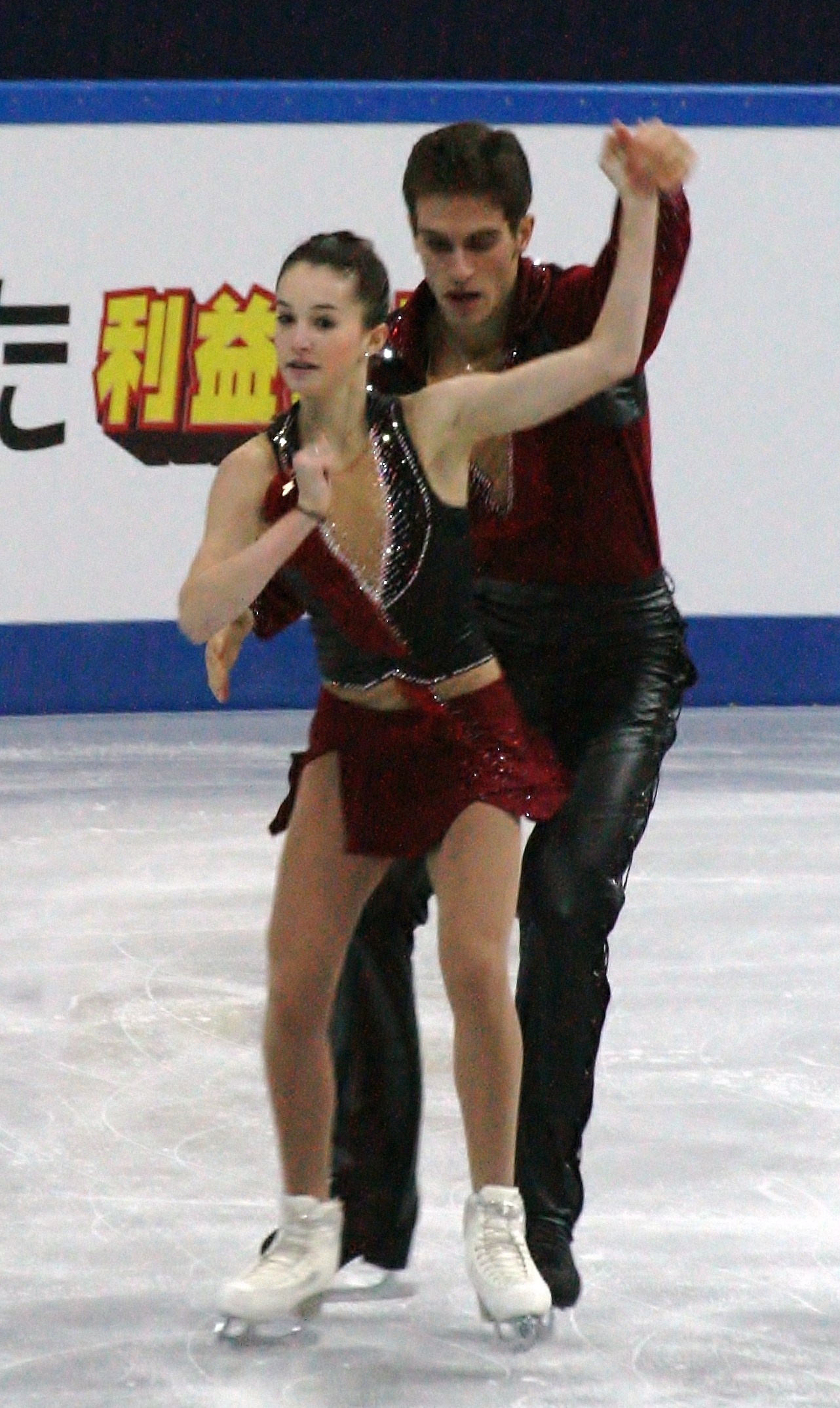 Василиса Даванкова и Андрей Депутат (Россия) на финале Гран-при среди юниоров 2012-2013. Произвольная программа.